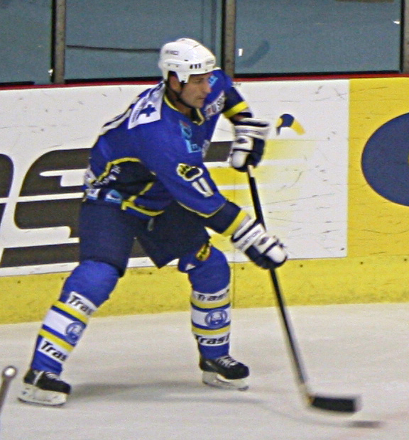 Brad Smyth